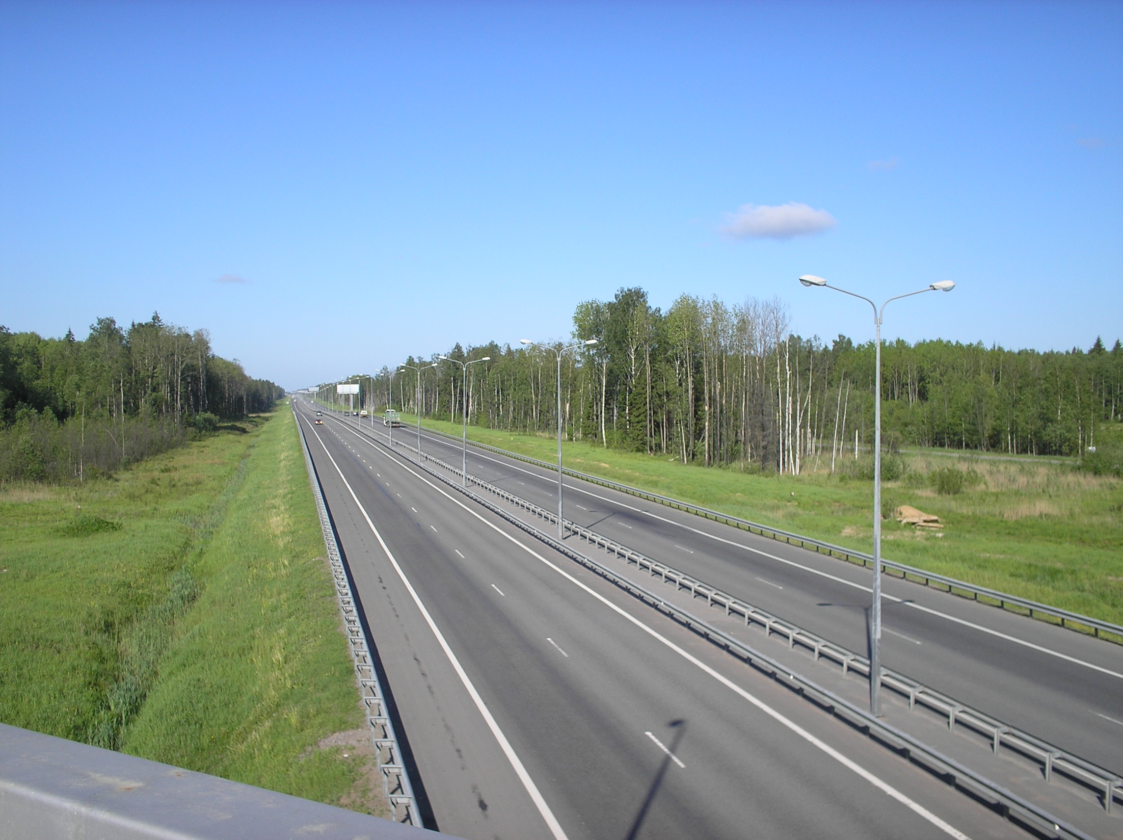 КАД в 8 км. от Финского залива (недалеко от Горской)